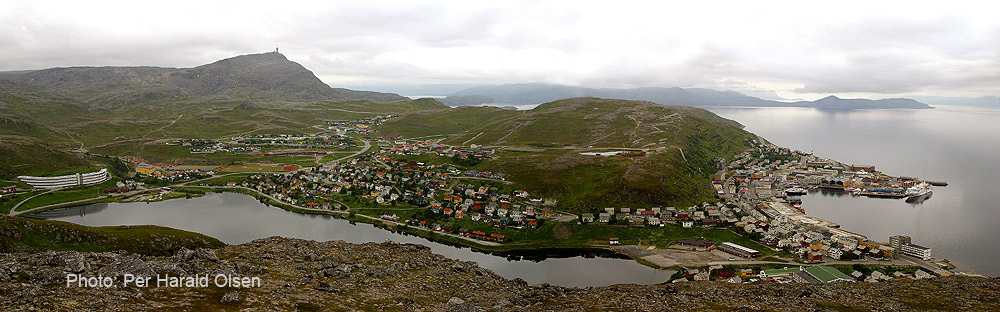 Hammerfest med Storvatnet i forgrunnen.